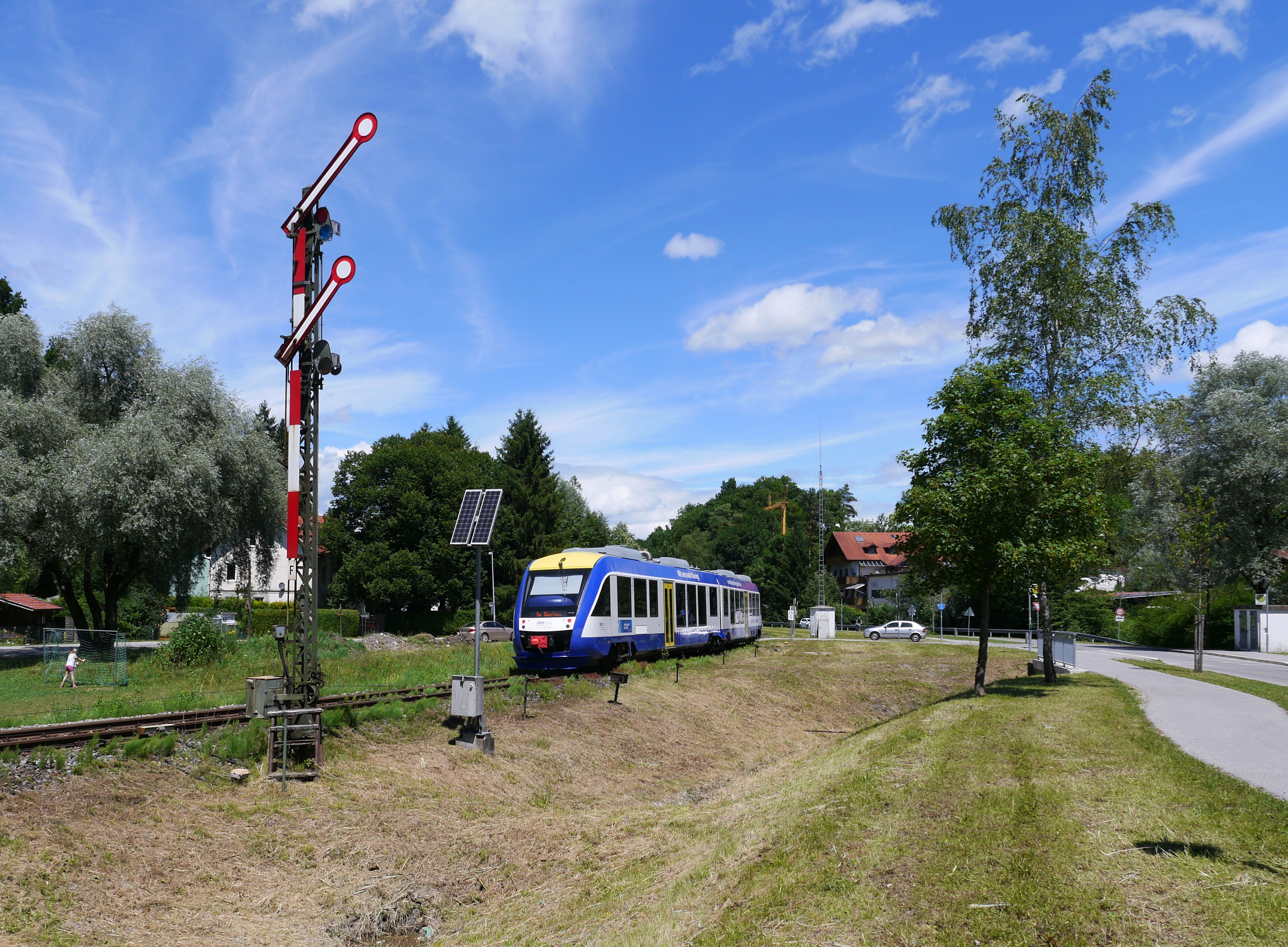 LINT 41 mit der Nummer 648 211 als BRB 86532 am südlichen Einfahrsignal des Bahnhofs Peißenberg